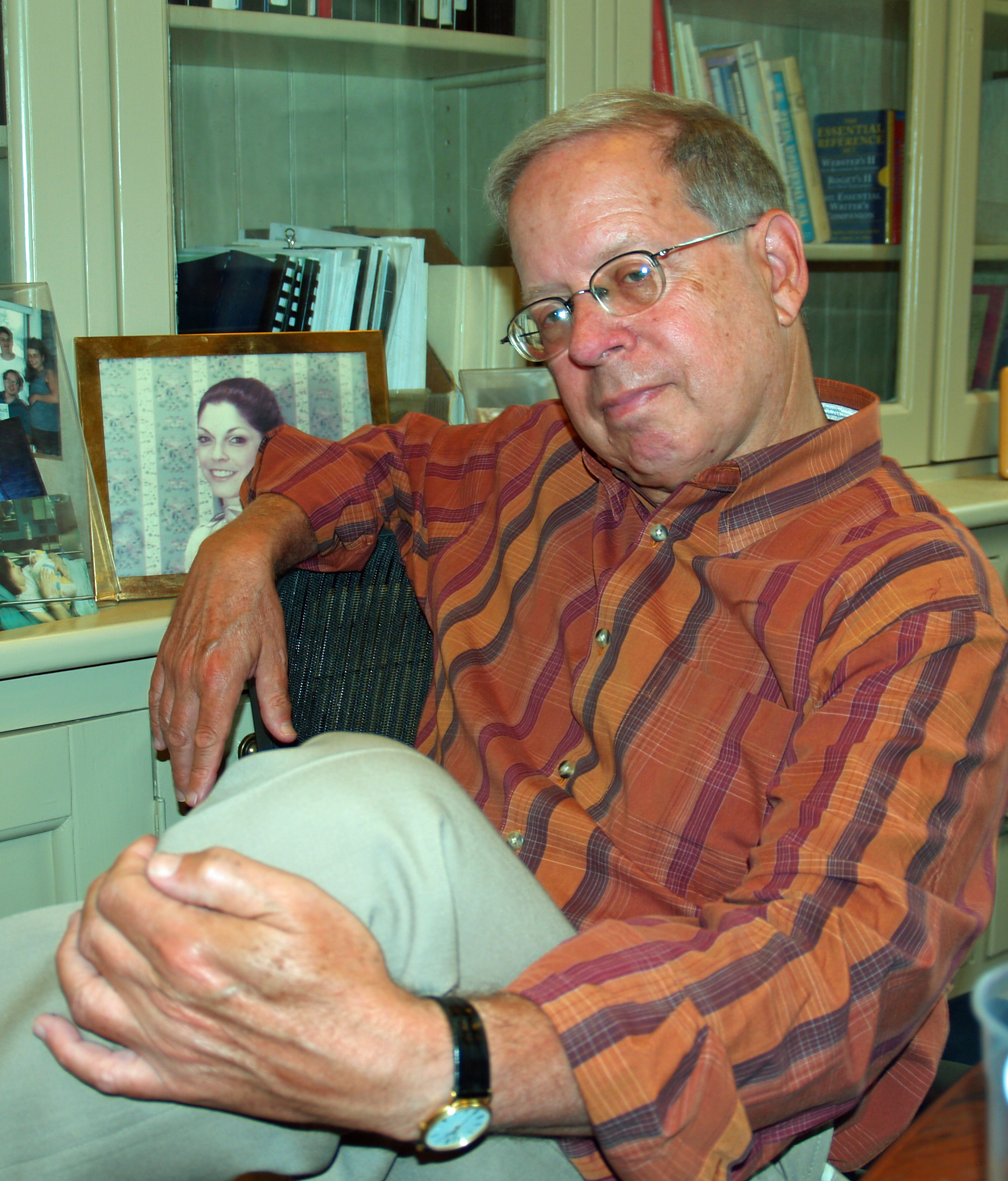 Michael Rebell